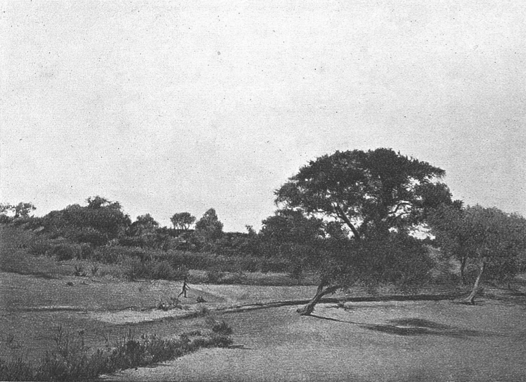 Mission Foureau-Lamy: Gâo (Acacia albida) près du village de Bourourou, Damergou.